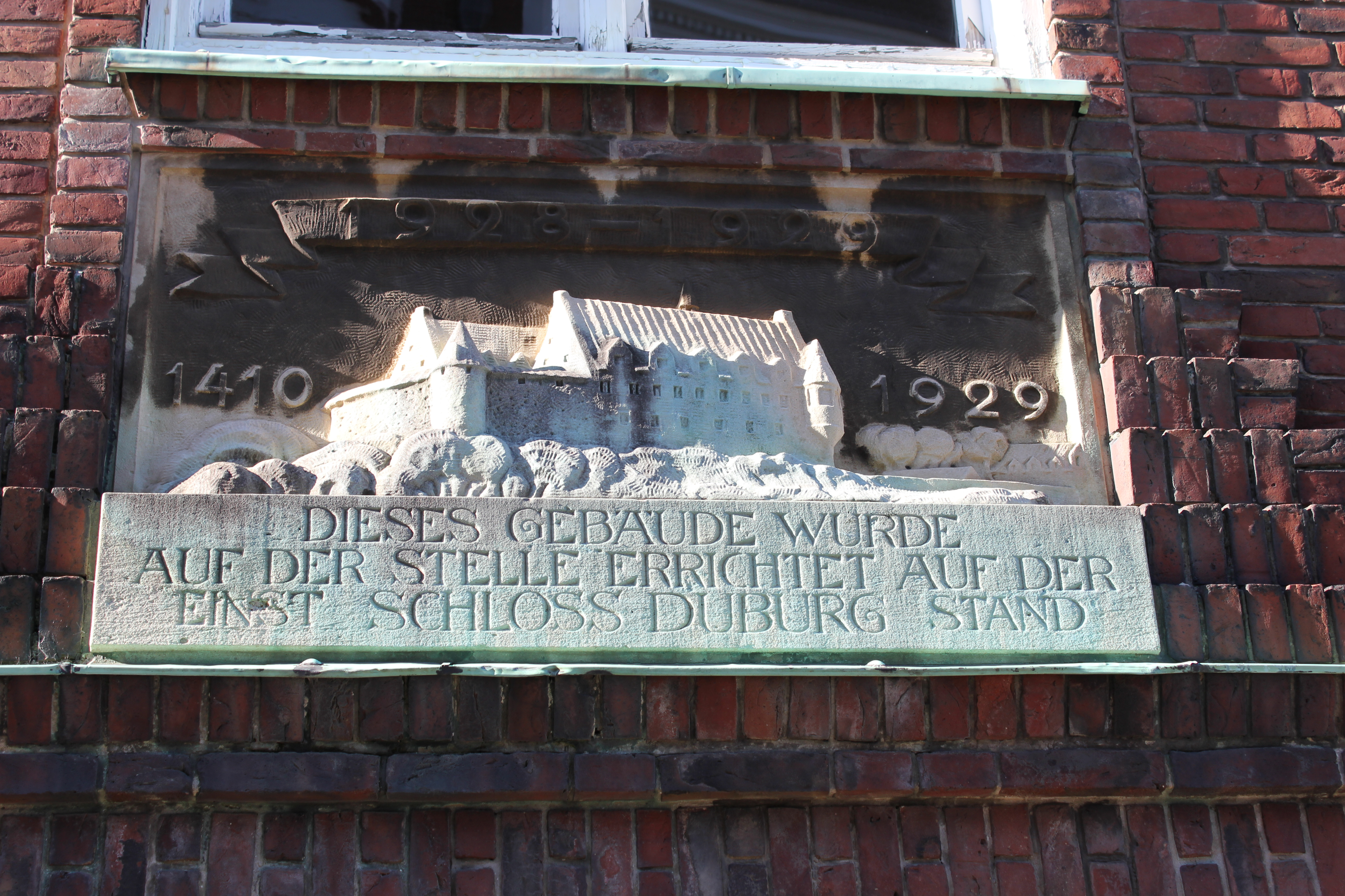 Gedenktafel an die Duburg mit Reliefdarstellung der Duburg an der Schloss-Duburg-Schule Städtische Handelslehranstalten beziehungsweise der Städtischen Handelslehranstalt Flensburg, welche auf dem Platz der ehemaligen Duburg erbaut wurde